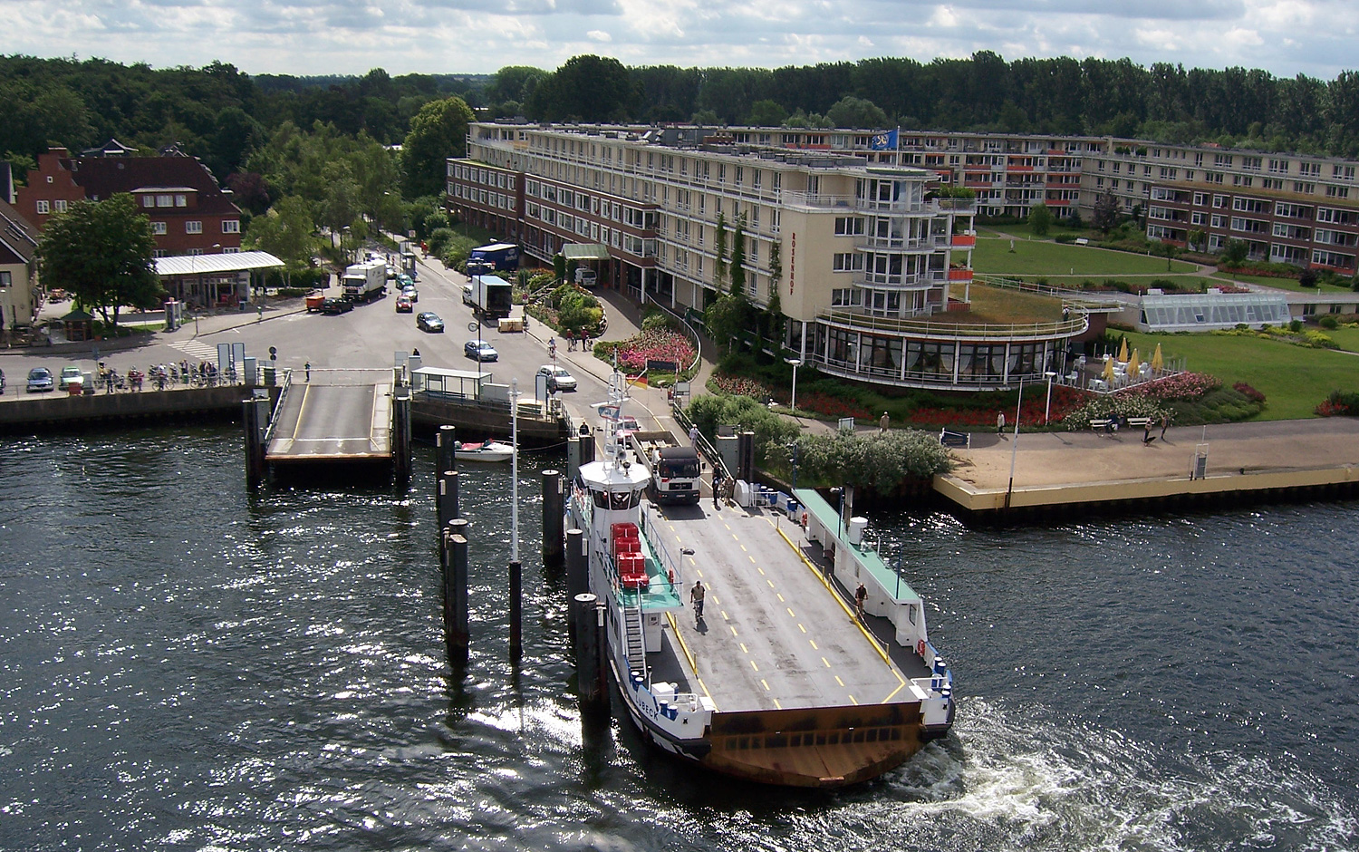 Priwall: Blick auf Fähranleger und Rosenhof